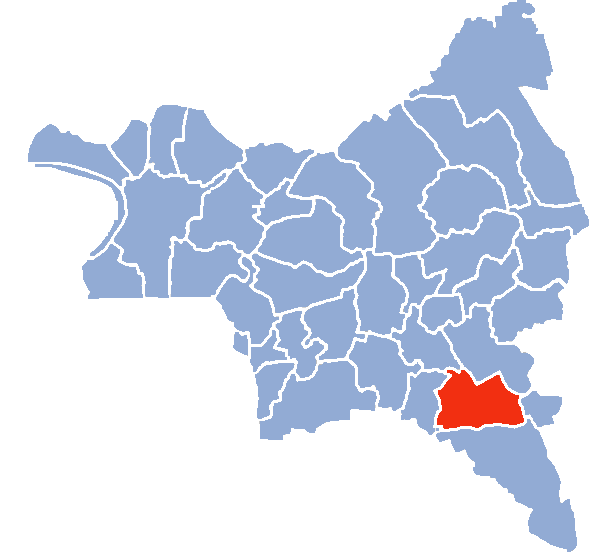 Auteur Hervé SUAUDEAU Licensing Catégorie:Cartes de Seine-saint-Denis Catégorie:Neuilly-sur-Marne